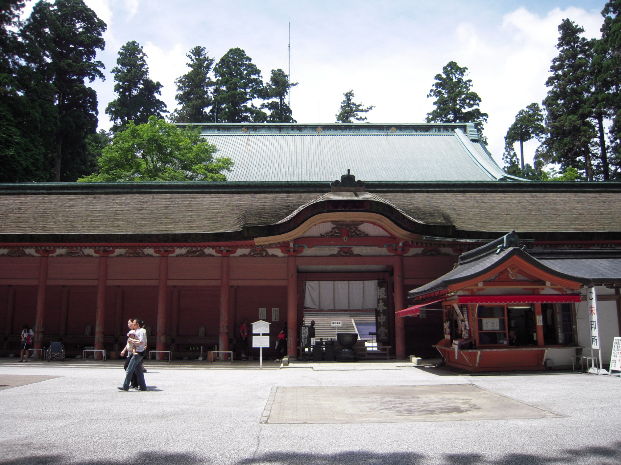 比叡山延暦寺 - Enryaku-ji // 2010.08.07 - 252